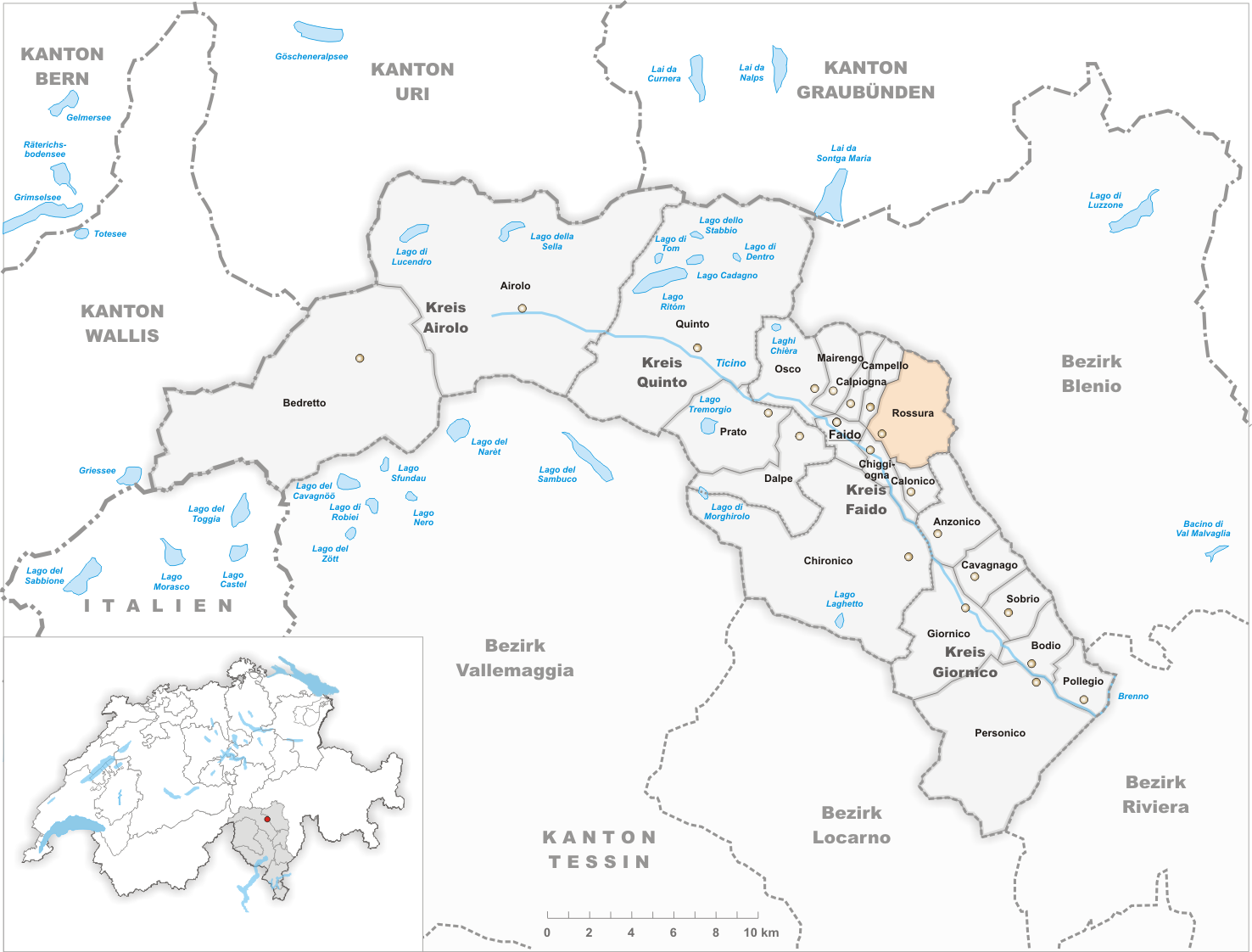 Municipality Rossura